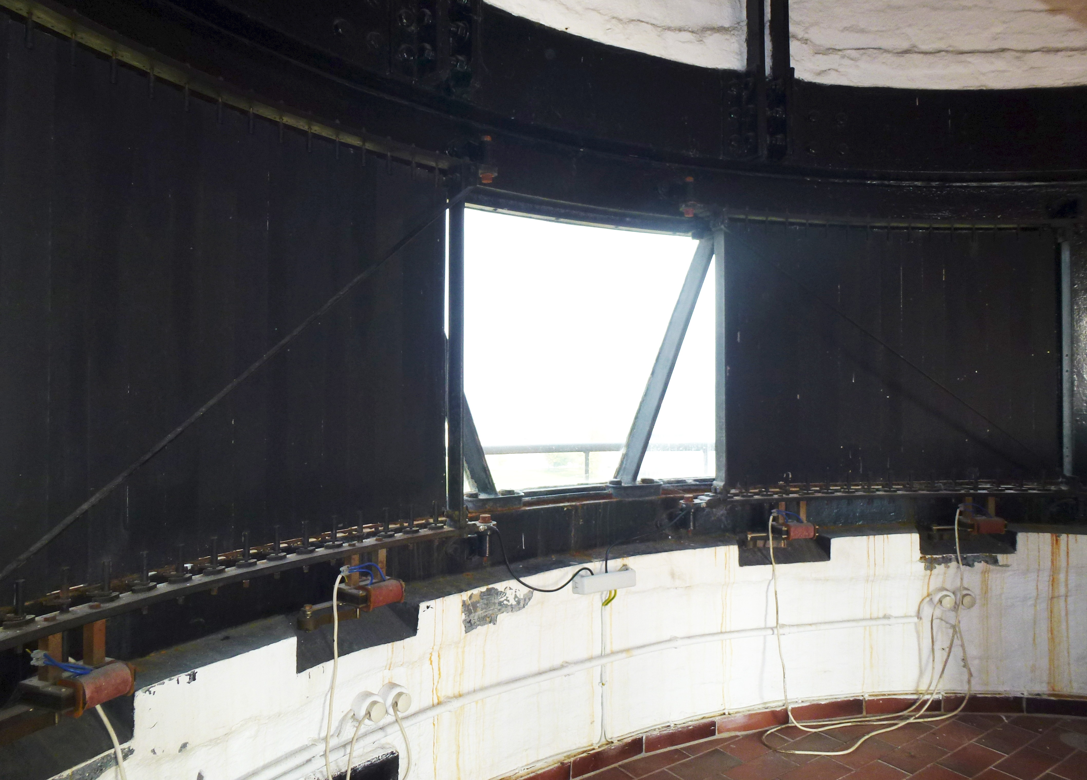 Leuchtturm Travemünde. Die Otterblenden gaben den beiden seitlichen Warnsektoren jeweils eine Blitz- bzw. Blitz-Gruppen-Kennung.